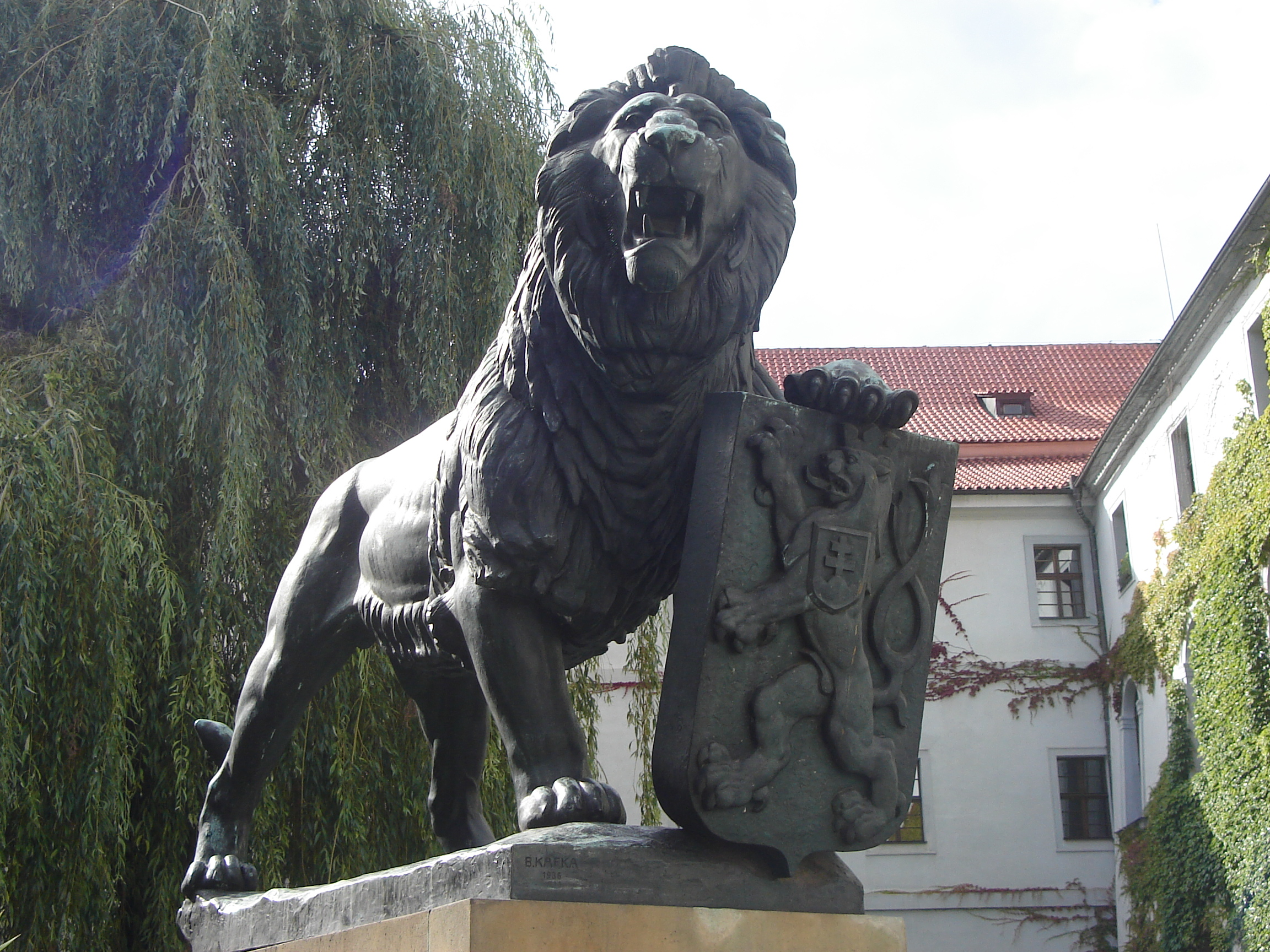 Estatua de un león con un escudo en el recinto del castillo de Praga. Lion statue with COA of Czechoslovakia in the Strahov Monastery in Hradčany, Prague.